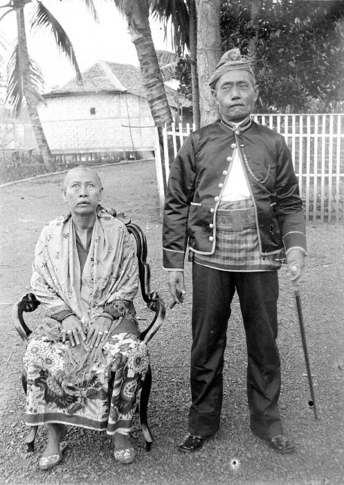 Negatief. Negara is vermoedelijk de plaats waar het rijk Negara Daha was gevestigd tot begin 16e eeuw het sultanaat Bandjermasin werd gesticht. Het gebied had in de 19e eeuw een uitzonderlijk hoge bevolkingsdichtheid voor Borneo. Het stadje Negara was een centrum van nijverheid, waar bijvoorbeeld traditionele, maar ook relatief moderne wapens vervaardigd werden. Dergelijke vormen van nijverheid waren vaker een teken dat er ooit een vorstelijk hof was geweest. Negara was het centrum van de Hoeloe Soengai, een al vroeg ontboste streek, waar veel mensen leefden van het planten van rijst en peper. (P. Boomgaard, 2001). Districtshoofd met vrouw in Negara, Borneo Districtshoofd met echtgenote, Negara, Borneo's Zuider-en Oosterafdeling, ca. 1915